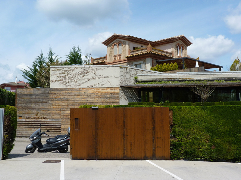 L'entrada